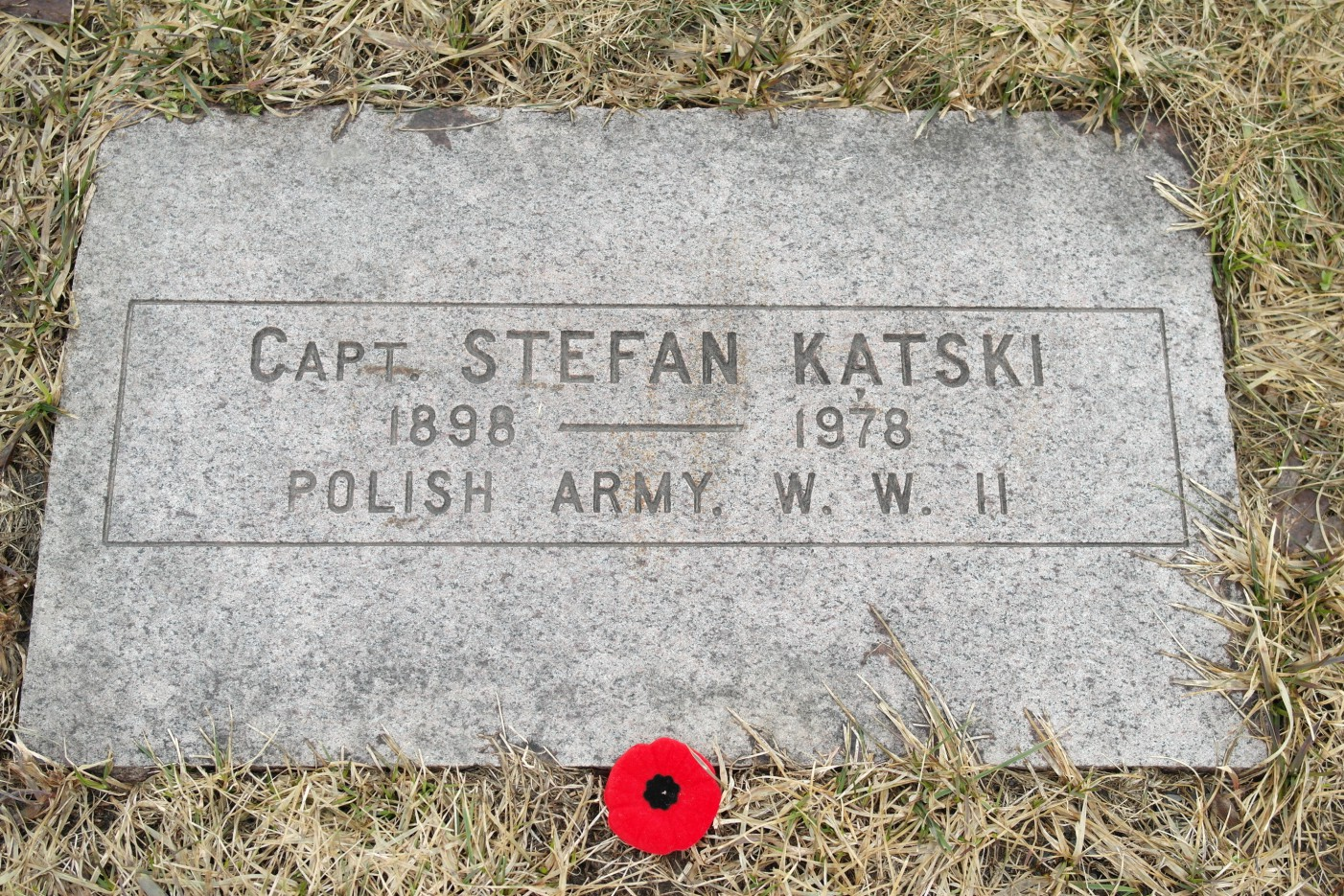 Stefan Kątski, tablica nagrobna, Aleja Zasłużonych na Cmentarzu Weteranów „Field of Honour” w Pointe Claire, Quebec, Kanada, foto: K. Szrodt